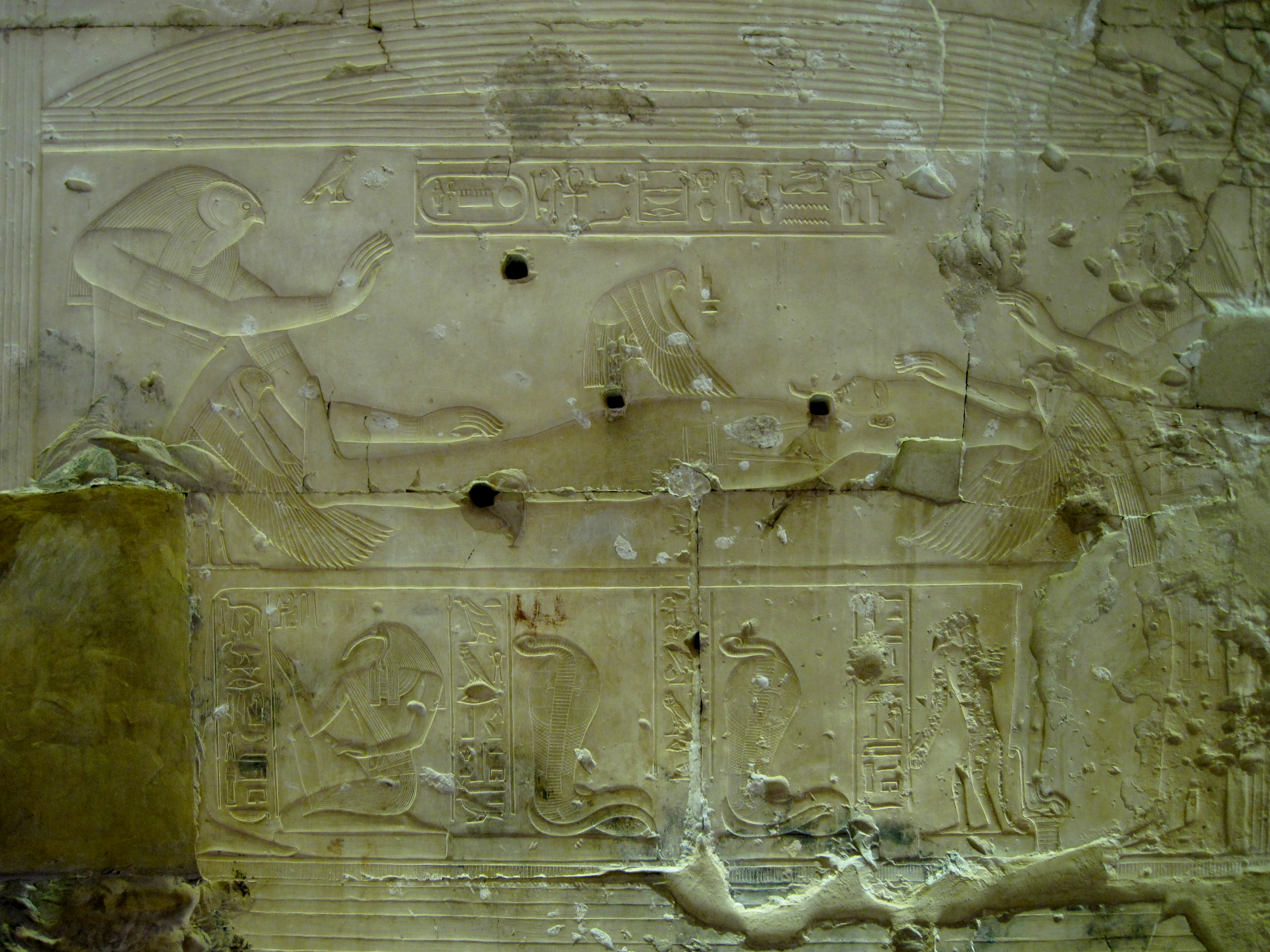 Relief der Erweckung des Gottes Osiris durch die Göttin Isis im Totentempel Sethos I. in Abydos, Ägypten